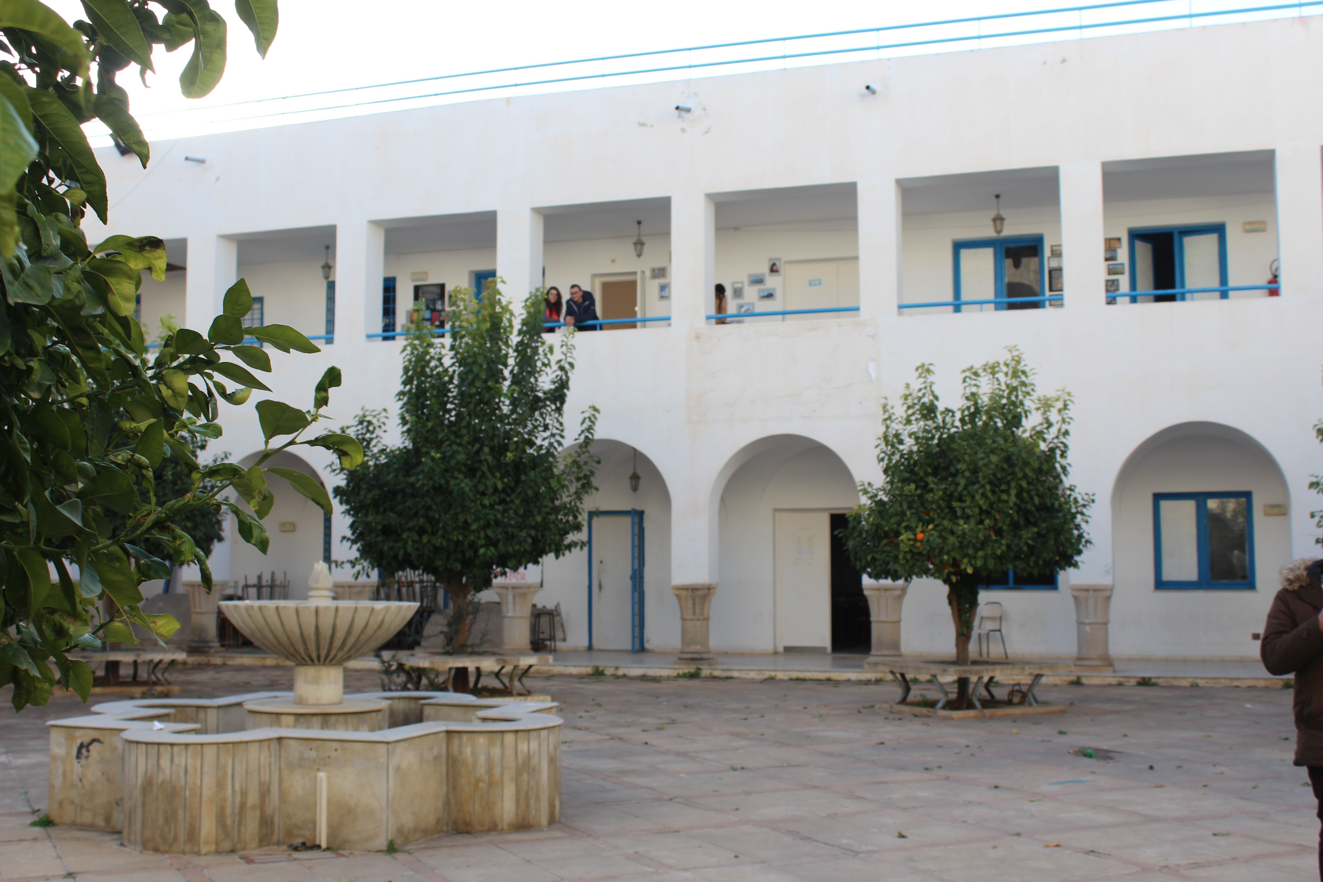 ENAU Tunis